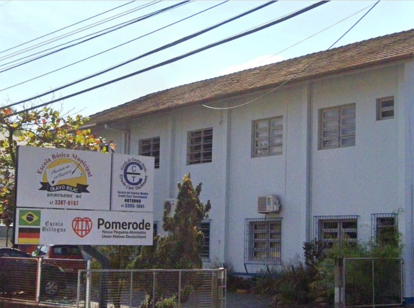 EMEF Olavo Bilac